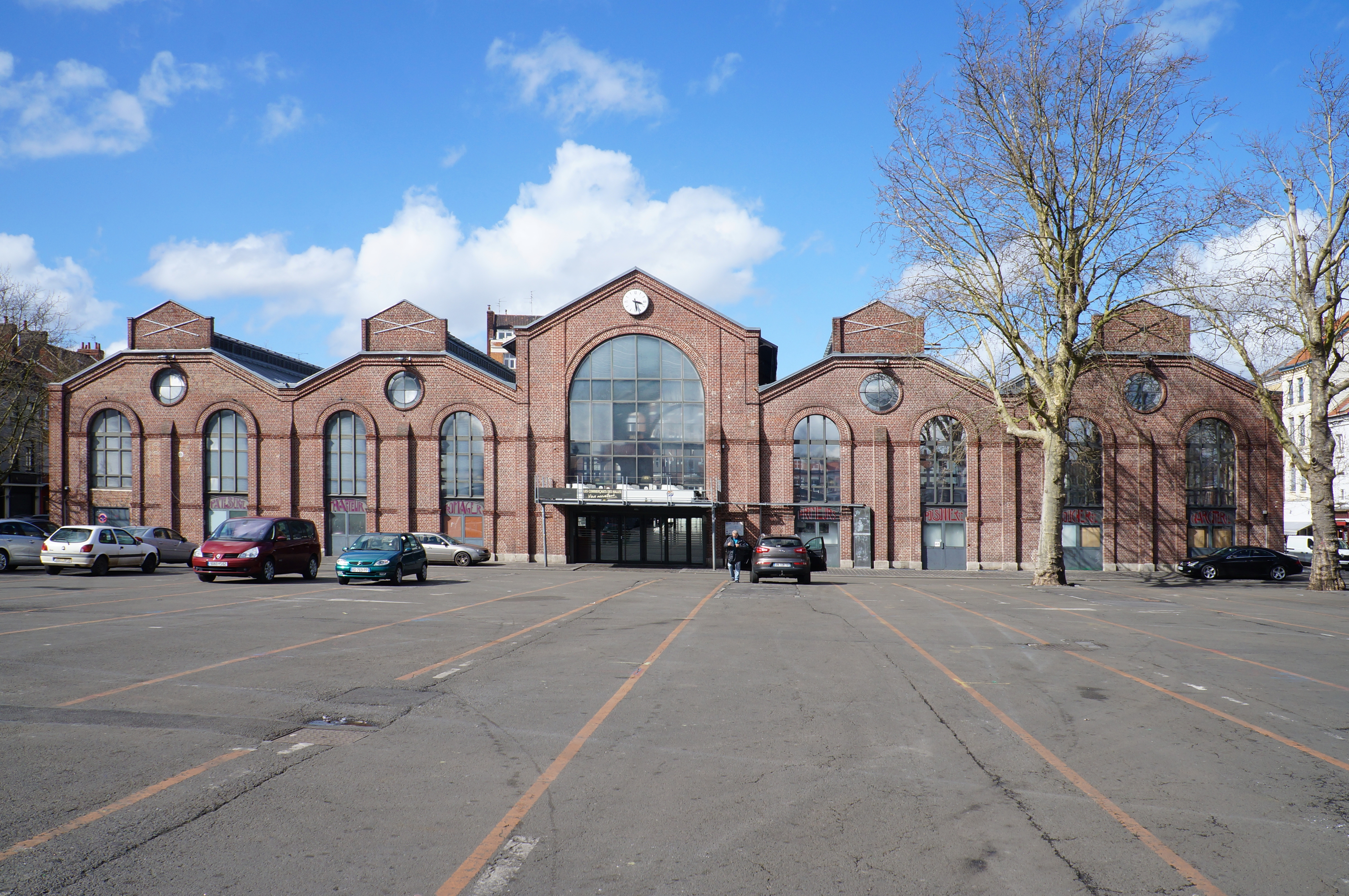 Les Halles de Wazemmes , place de la Nouvelle Aventure à Lille Nord (département français)